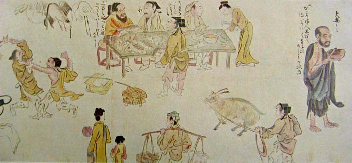 Эрзянь: Gengyo 2 : Popular scene.